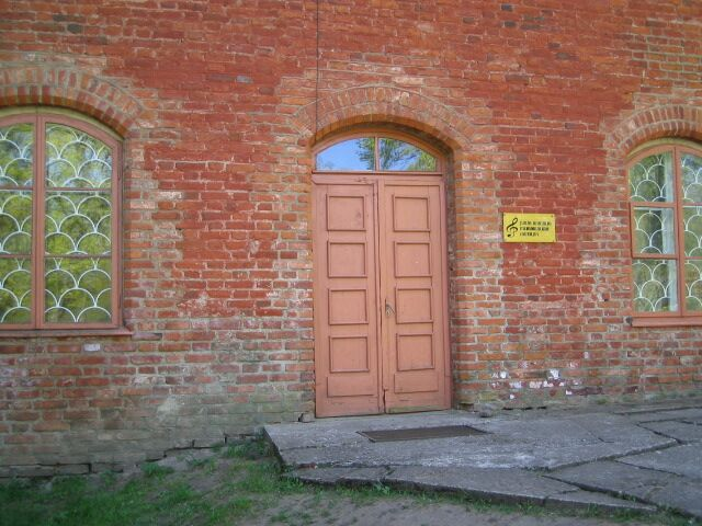 J. Naujalio muziejus Raudondvario pilyje.